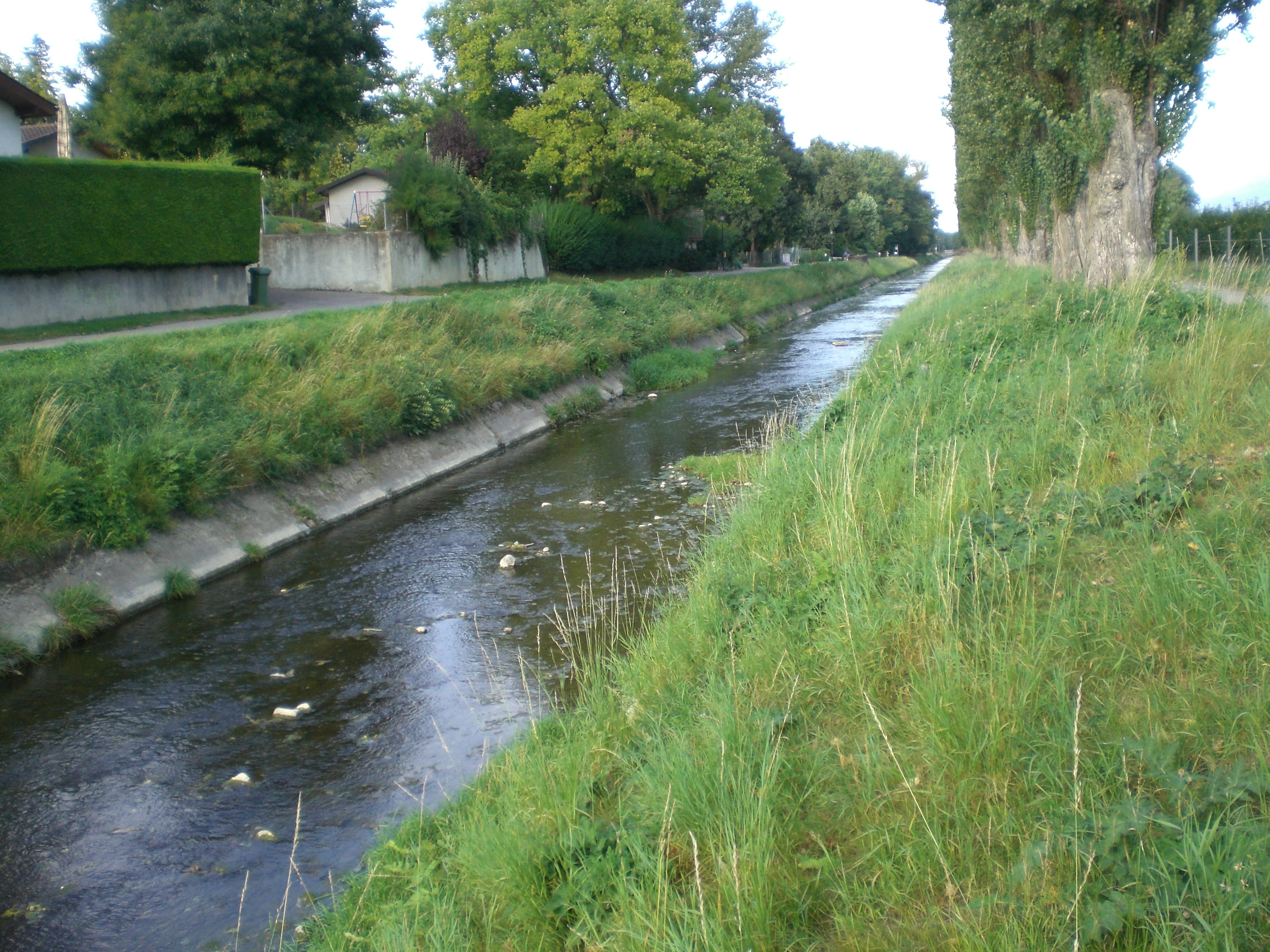 Canal de l'Aire, près de Lully